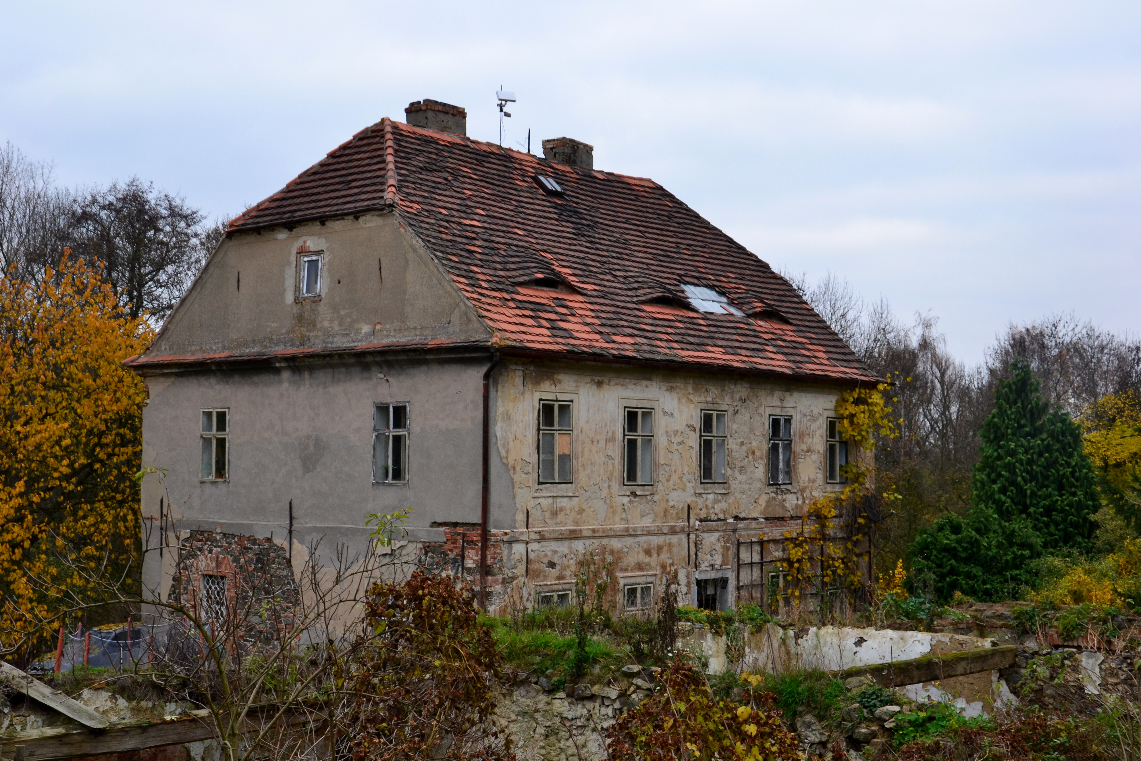 Fara, Vilémov 111, Vilémov (okres Chomutov).